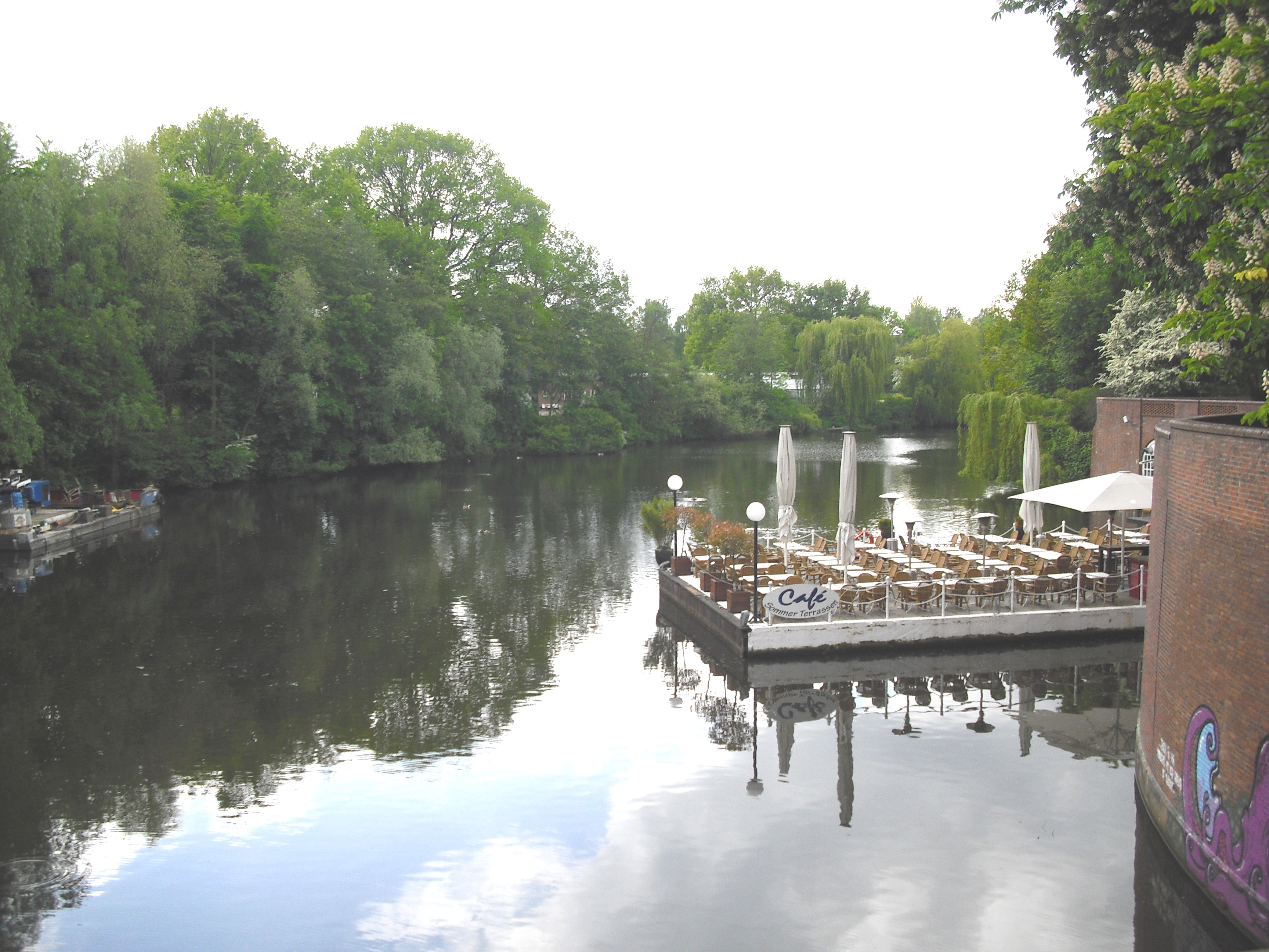 Goldbekkanal